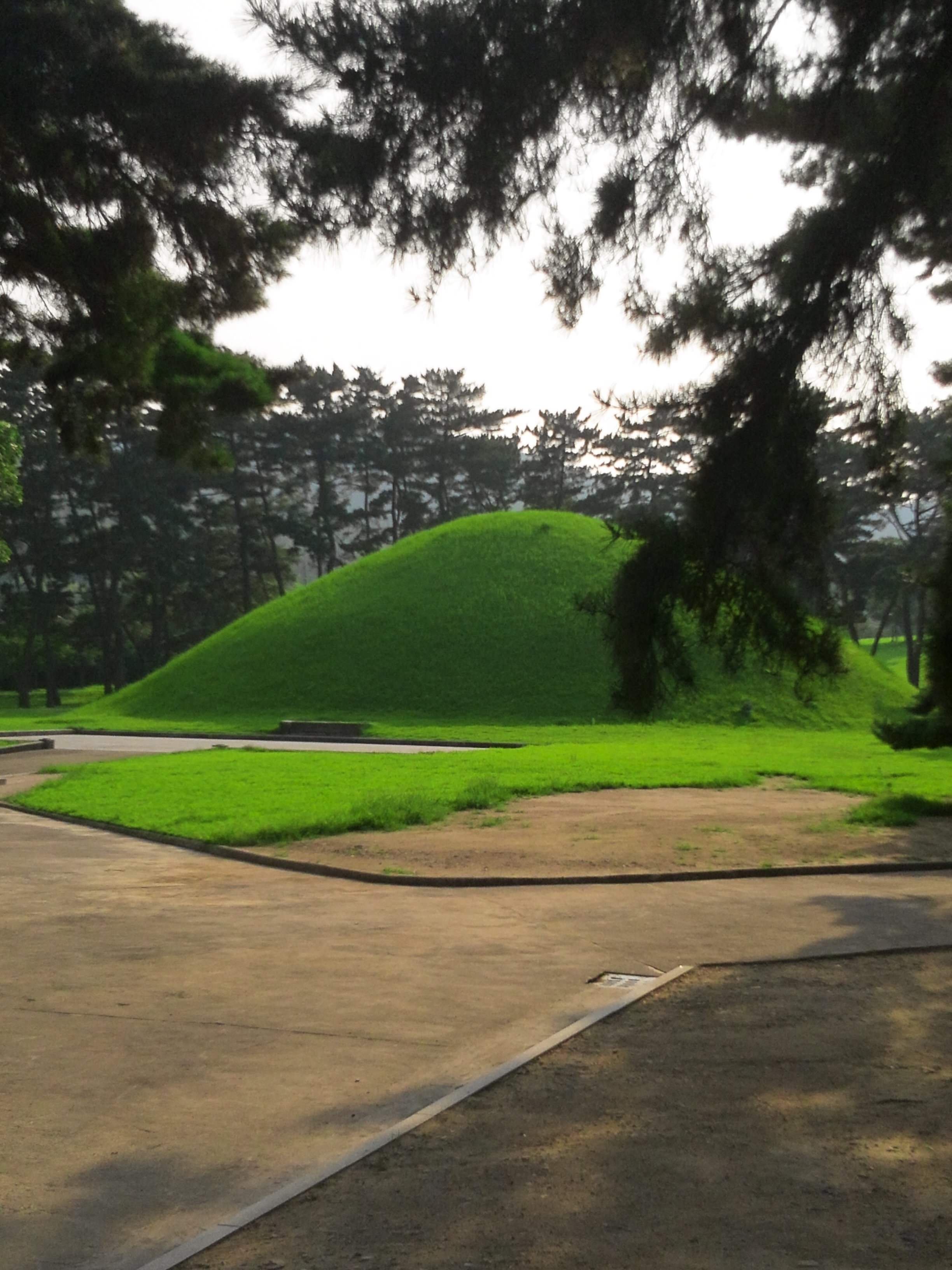 태종 무열왕의 무덤